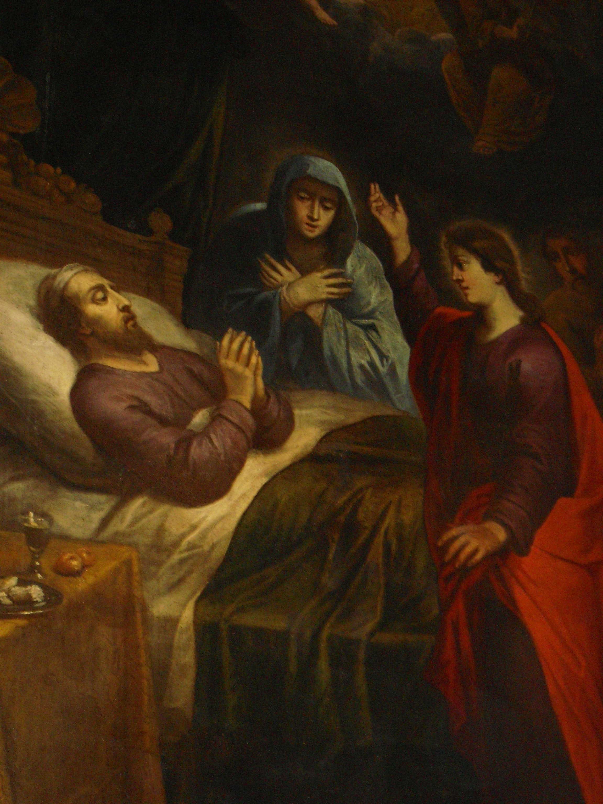 Muerte de San José, cuadro en la Basílica de la Asunción de Nuestra Señora de Lequeitio (Vizcaya, País Vasco, España)